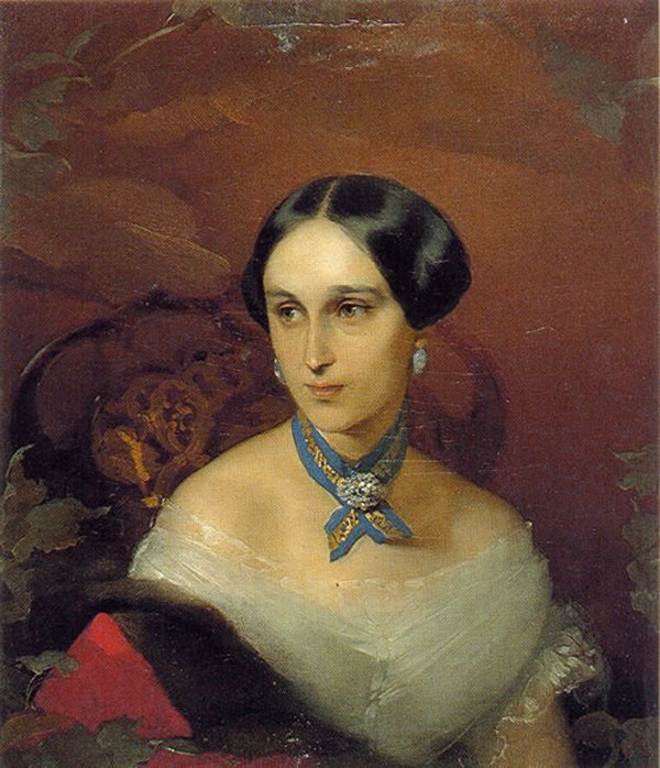 Портрет Н. Н. Пушкиной-Ланской. Приписывается художнику Макарову, выполнен ок. 1849